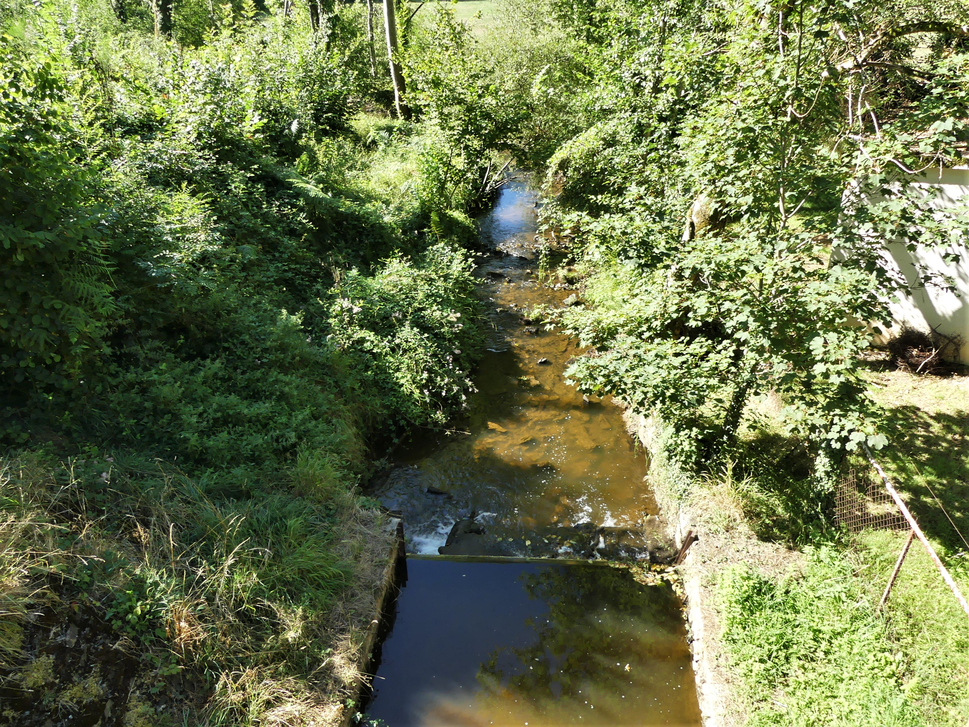 La Valouse en aval du pont de la route départementale 79 marque la limite entre Saint-Priest-les-Fougères (à gauche) et La Coquille (à droite), Dordogne, France.